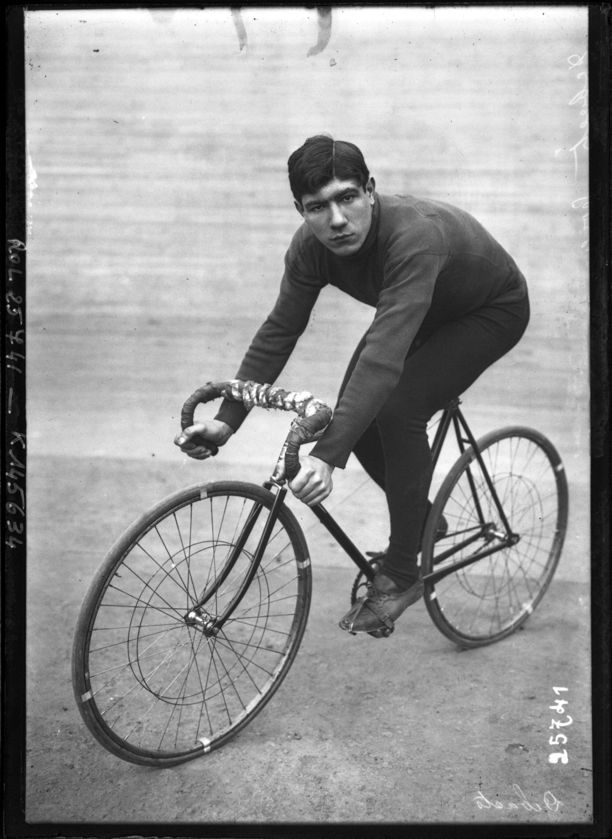 Gérard Debaets portrait du coureur cycliste avant le départ